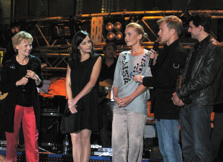 Koncert inaugurujący jesienną ramówkę TVP (Warszawa, ul. Woronicza): aktorzy serialu Czas honoru